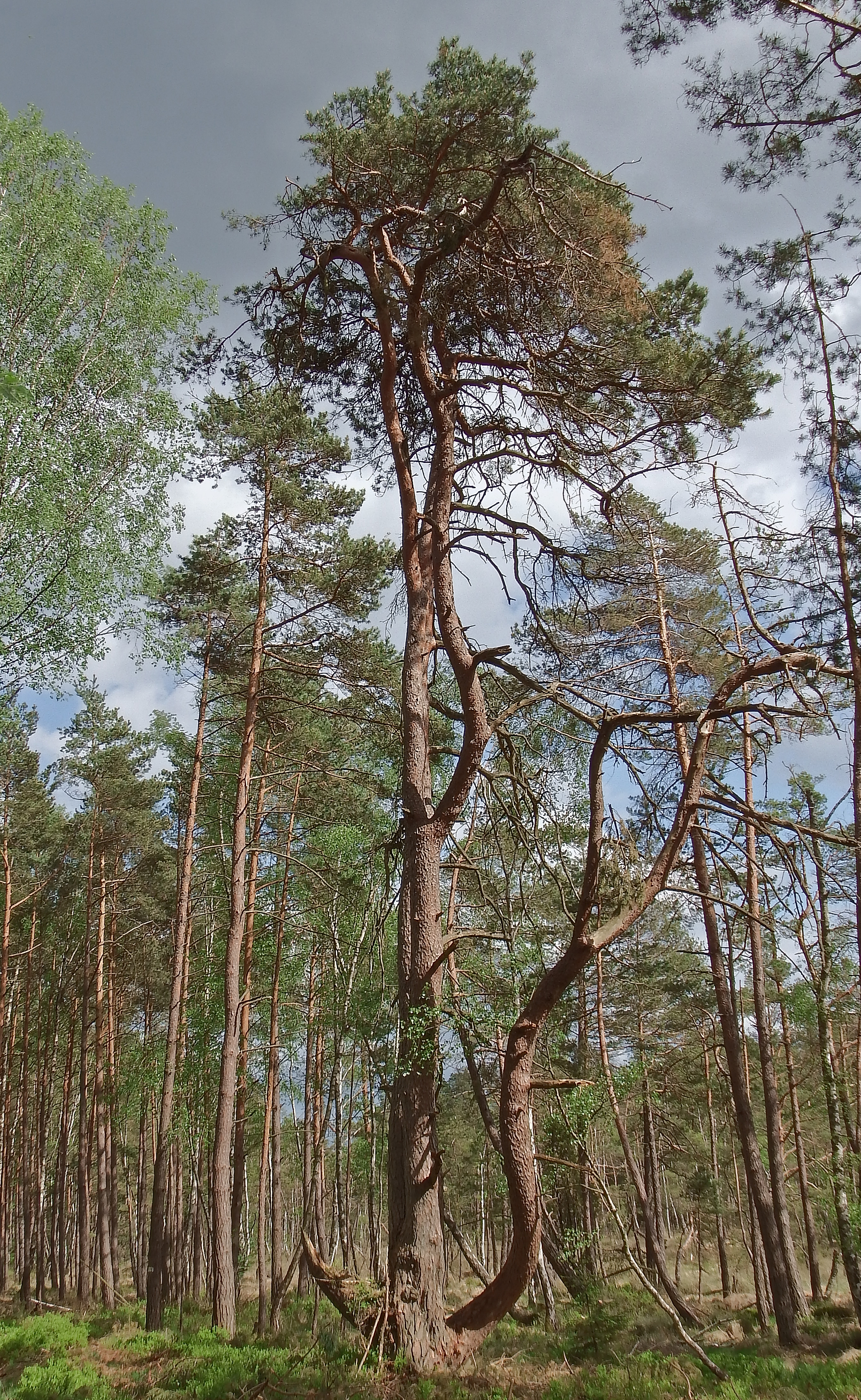 Naturdenkmal "ND WL 00003" im Landkreis Harburg (Niedersachsen): Kiefer, genannt „Kronleuchter“, westlich von Döhle